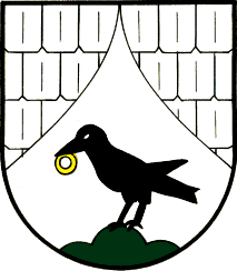 Wappen der Gemeinde Sankt Oswald bei Plankenwarth in Österreich